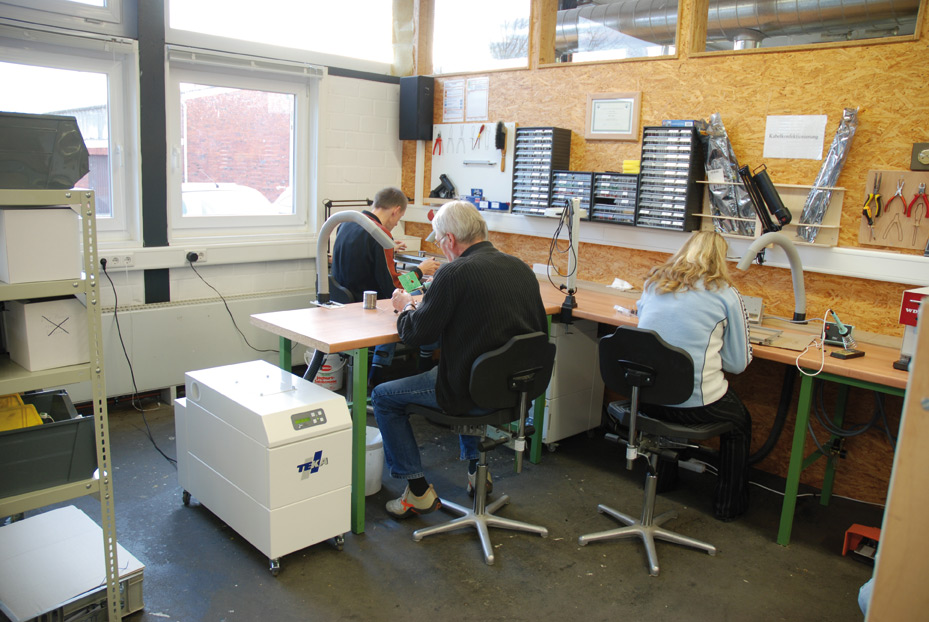 Lötrauchabsaugung der TEKA GmbH